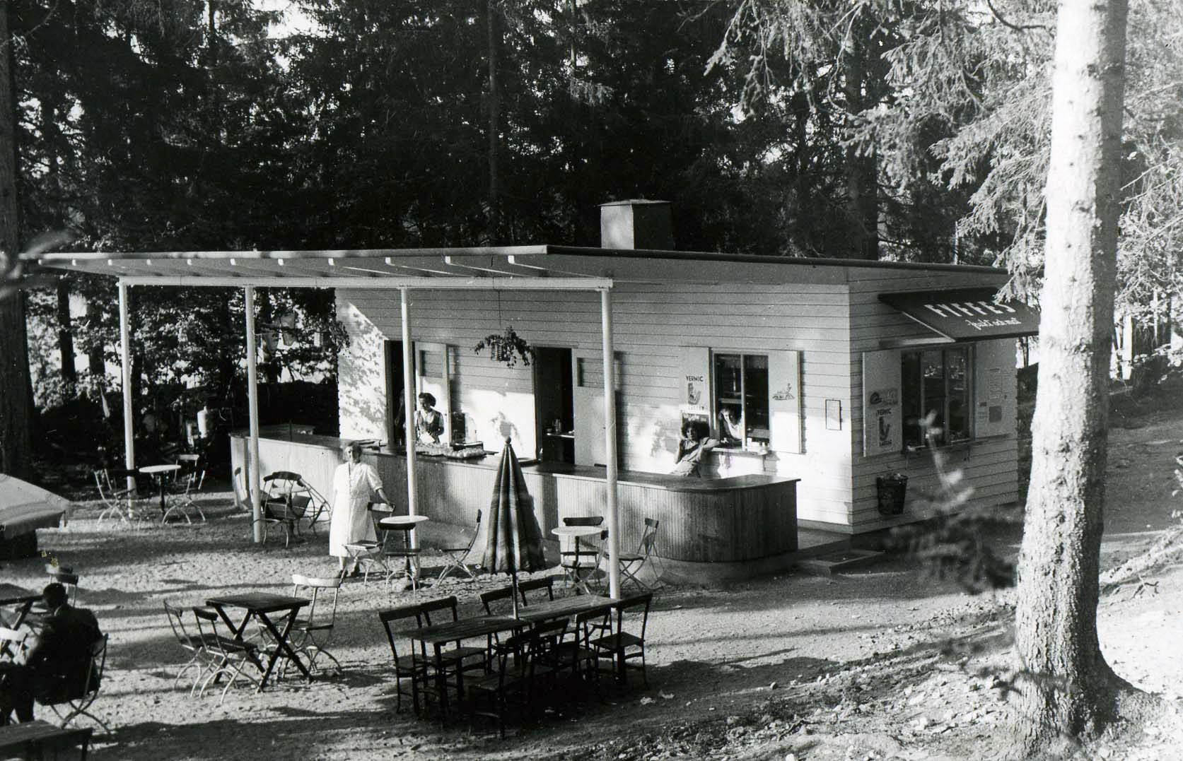 Mälarhöjdens friluftsbad: Serveringspaviljongen i augusti 1939